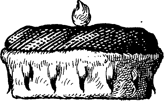 "[...] die ganz alte Form [Anm. des Kurhutes] [zeigt] Fig. 44."